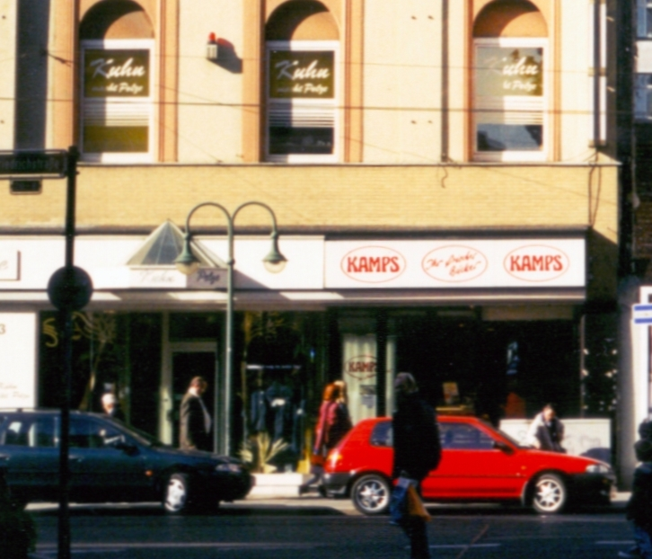 Friedrichstraße 23, 20217 Düsseldorf-Friedrichstadt (1997) Rechts die erste Filiale der Bäckerei-Kette Heiner Kamps (seit 1981) links Kürschnerei Pelzmodelle Kuhn, Klaus-Peter Kuhn (1986 bis 2001) vormals links: Wäschehaus Schütz vormals rechts: Photo Porst 2001 nach Umbau nur noch 1 Ladenlokal (Bäckerei Kamps)